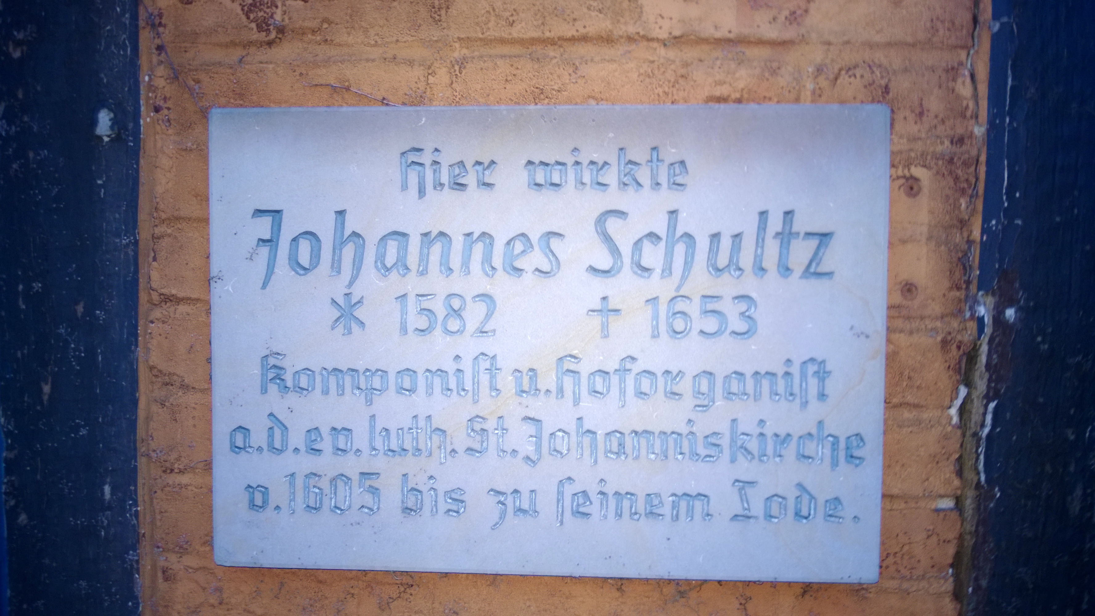 Wandtafel für den Komponisten Johannes Schultz. Gelebt und gestorben in Dannenberg (Elbe). Tafel ist gegenüber dem Kirchturm an einer Hauswand - links neben der früheren Superintendentur.